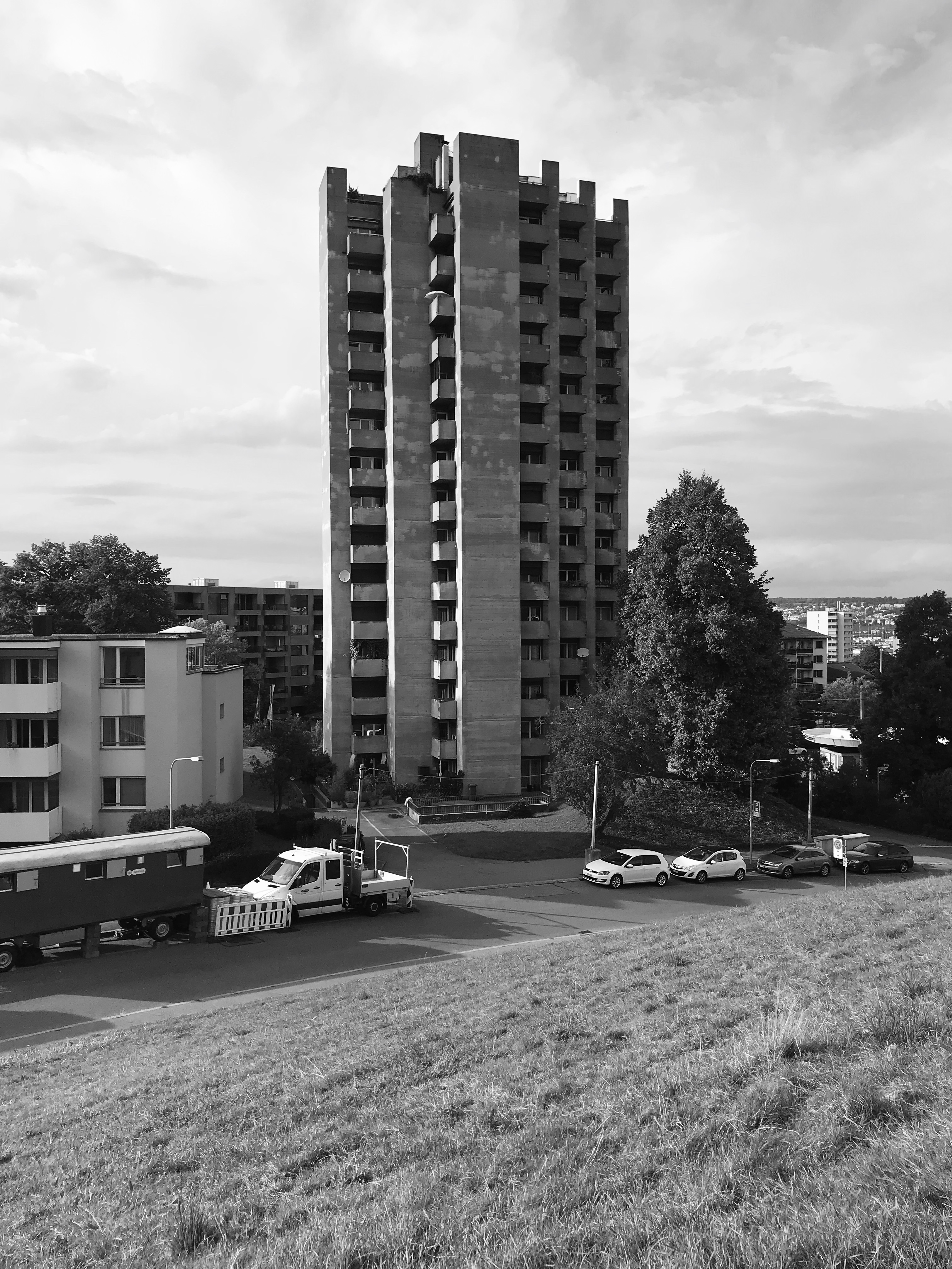 Brutalismus